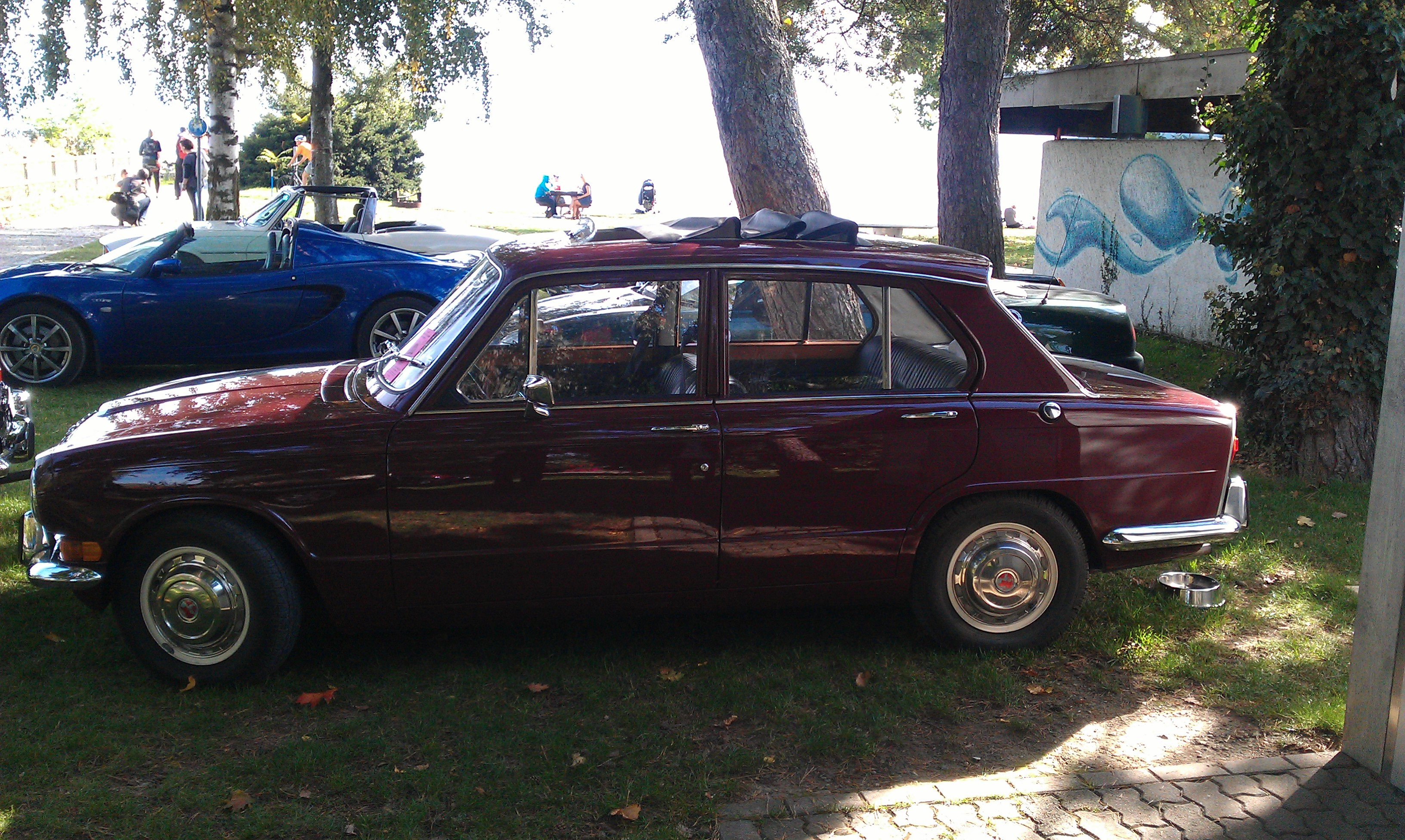 Triumph 1300